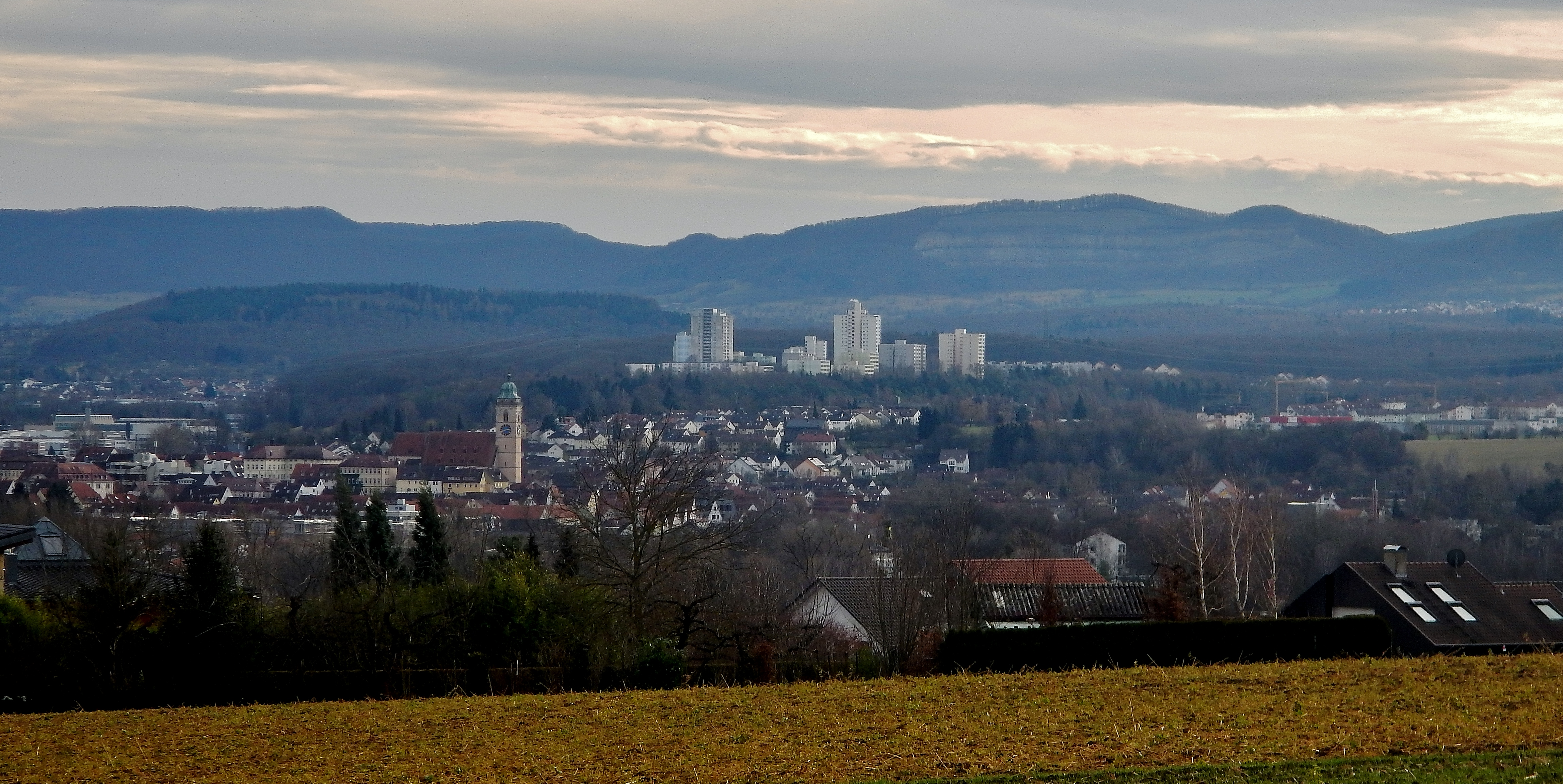 Blick über Nürtingen mit Stadtkirche Sankt Laurentius auf die schwäbische Alb